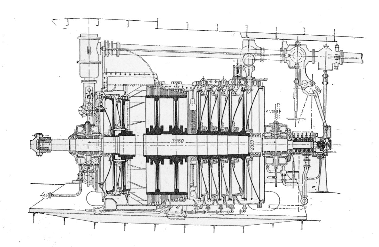 AEG marine steam turbine (Rankin Kennedy, Modern Engines, Vol VI).jpg